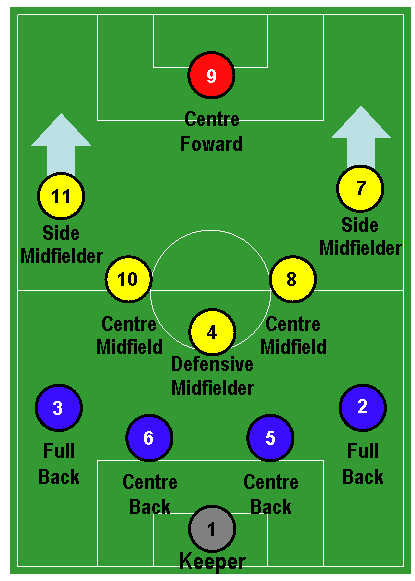 mia creazione